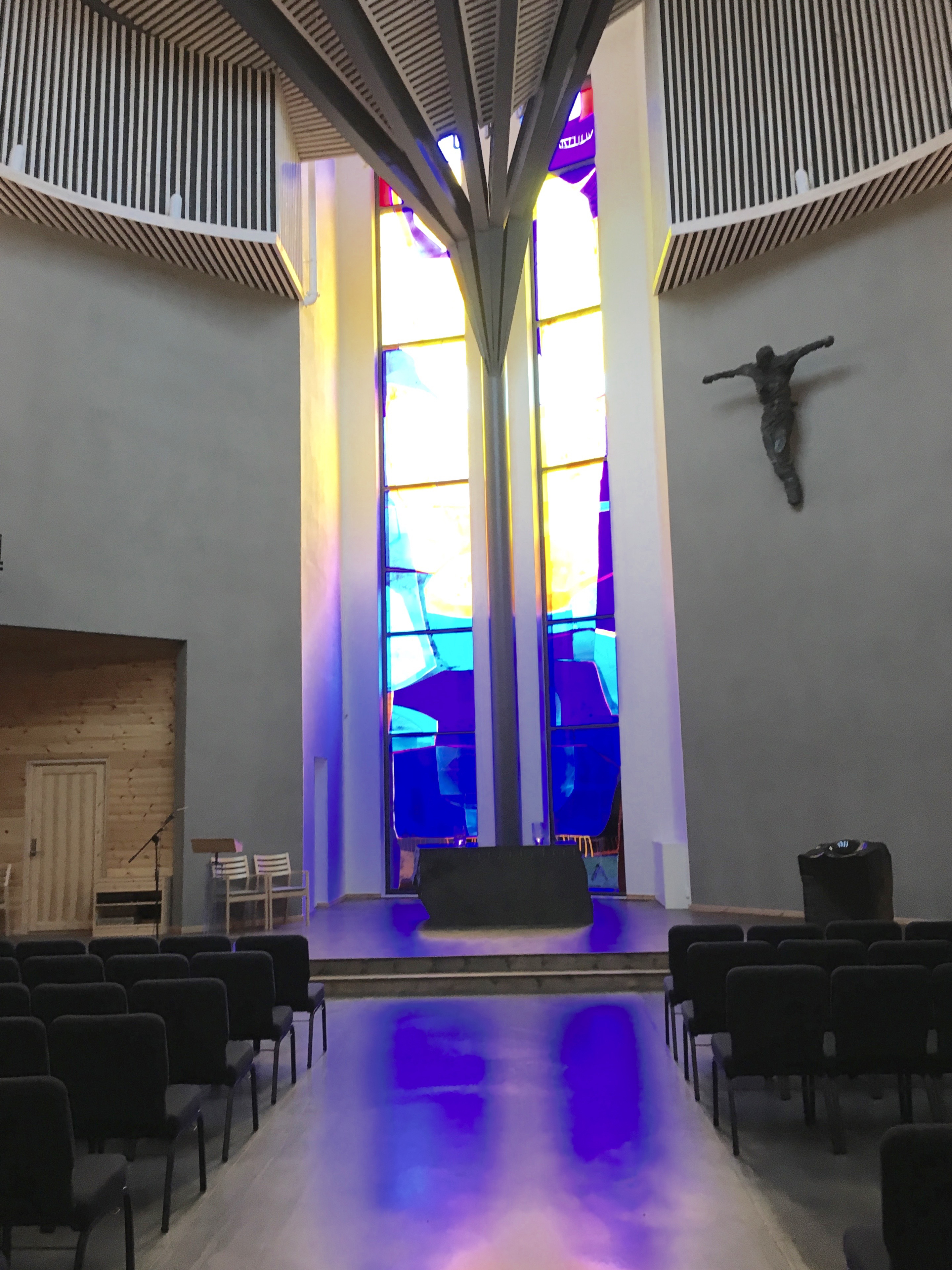 Geilo Kulturkirkes alter, Geilo, Norge